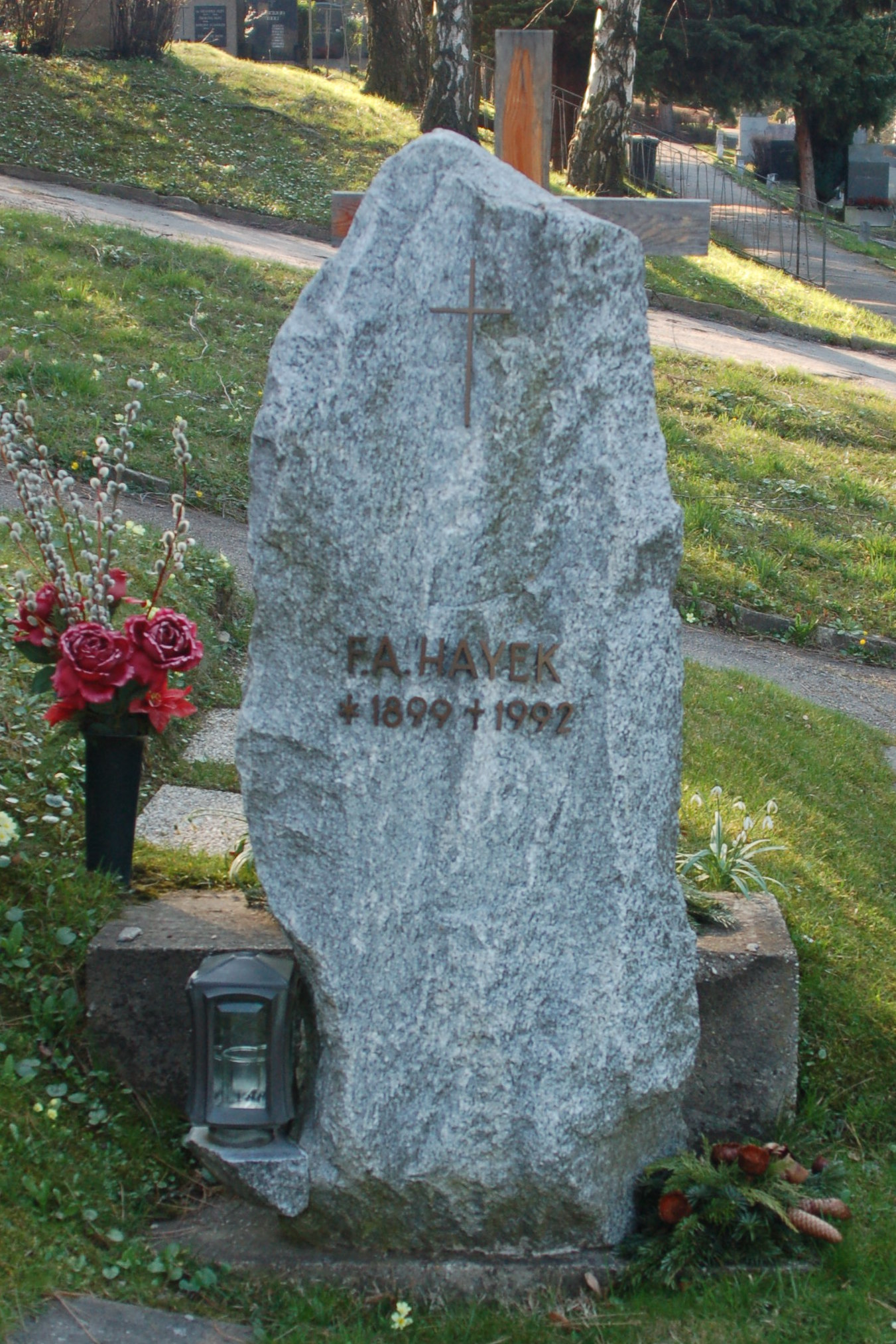 Neustifter Friedhof, Grabstätte von Friedrich August Hayek (Ehrengrab der Stadt Wien)